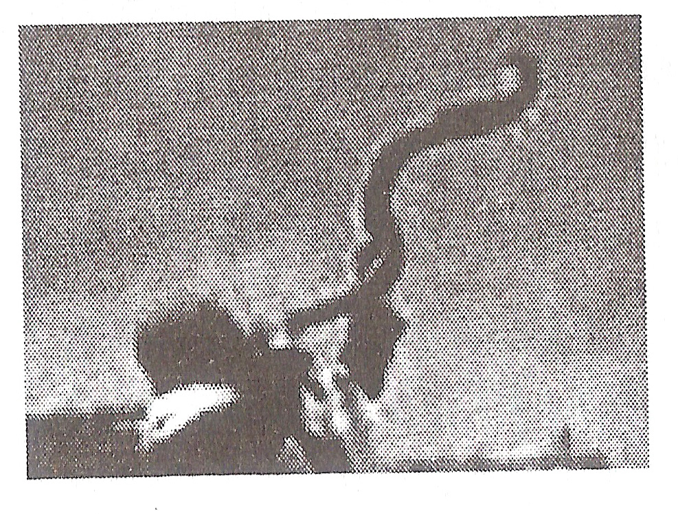 உயிர்த்தூம்பு - சங்ககால இசைக்கருவி. பத்துப்பாட்டு செய்தி உரை என்னும் எனது நூலிலிருந்து எடுத்துப்பதிவேற்றப்பட்டது.